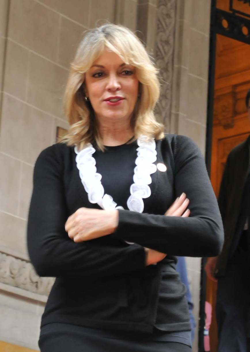 Buenos Aires. Agosto 24 de 2011. Los cancilleres de la UNASUR posan para la foto oficial en el Palacio San Martín, encabezando el Canciller Timerfman y la Presidenta de UNASUR, Maria Emma Mejía. foto Roberto Daniel Garagiola